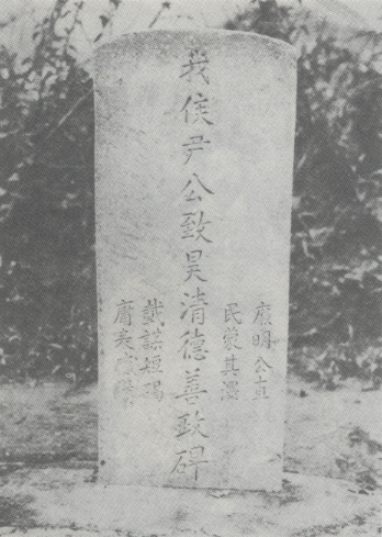 함경남도 원산에 세워진 윤치호 선정비